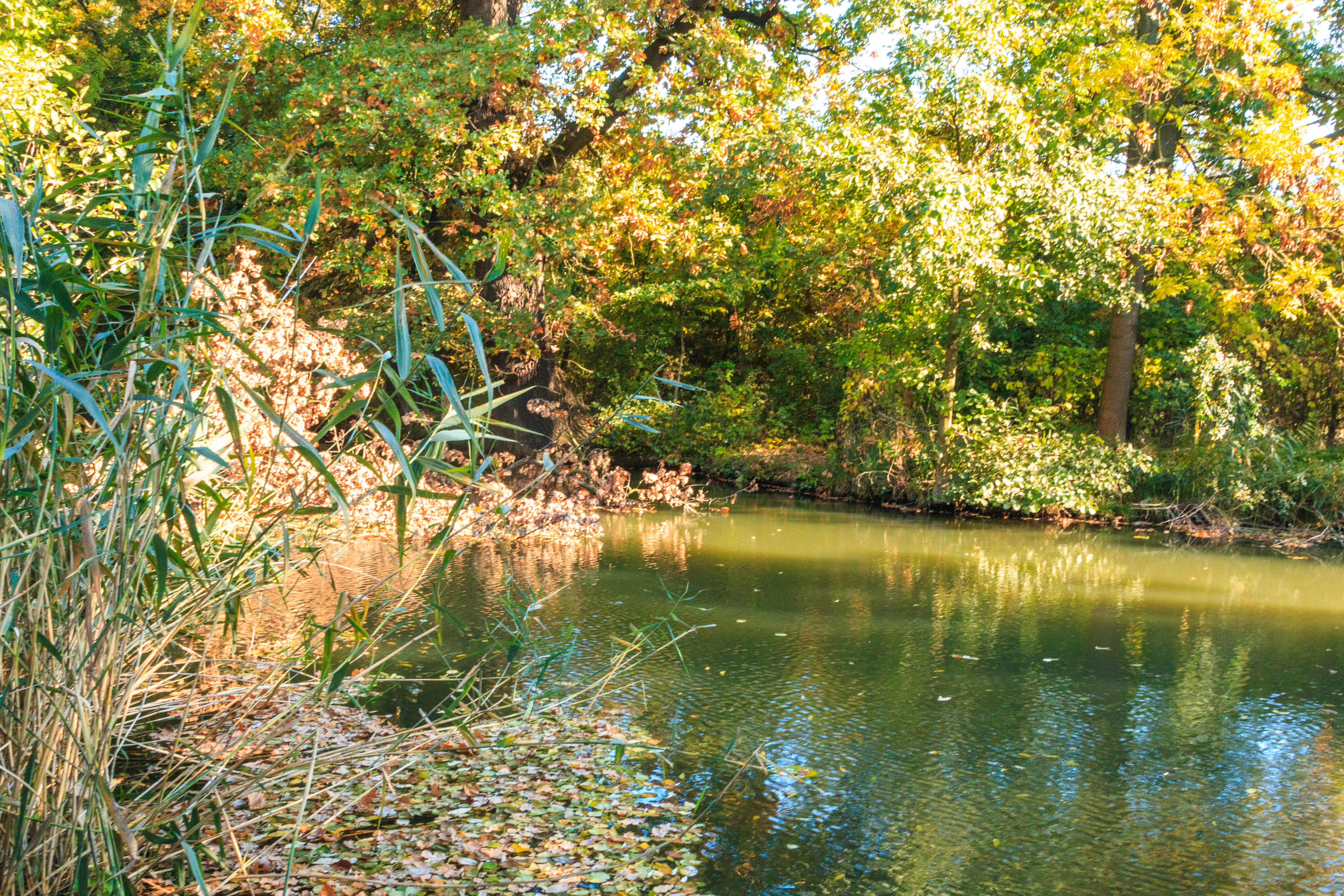 Jezuitská jezera - mrtvé rameno Orlice v Malšovicích Project: Vodstvo.